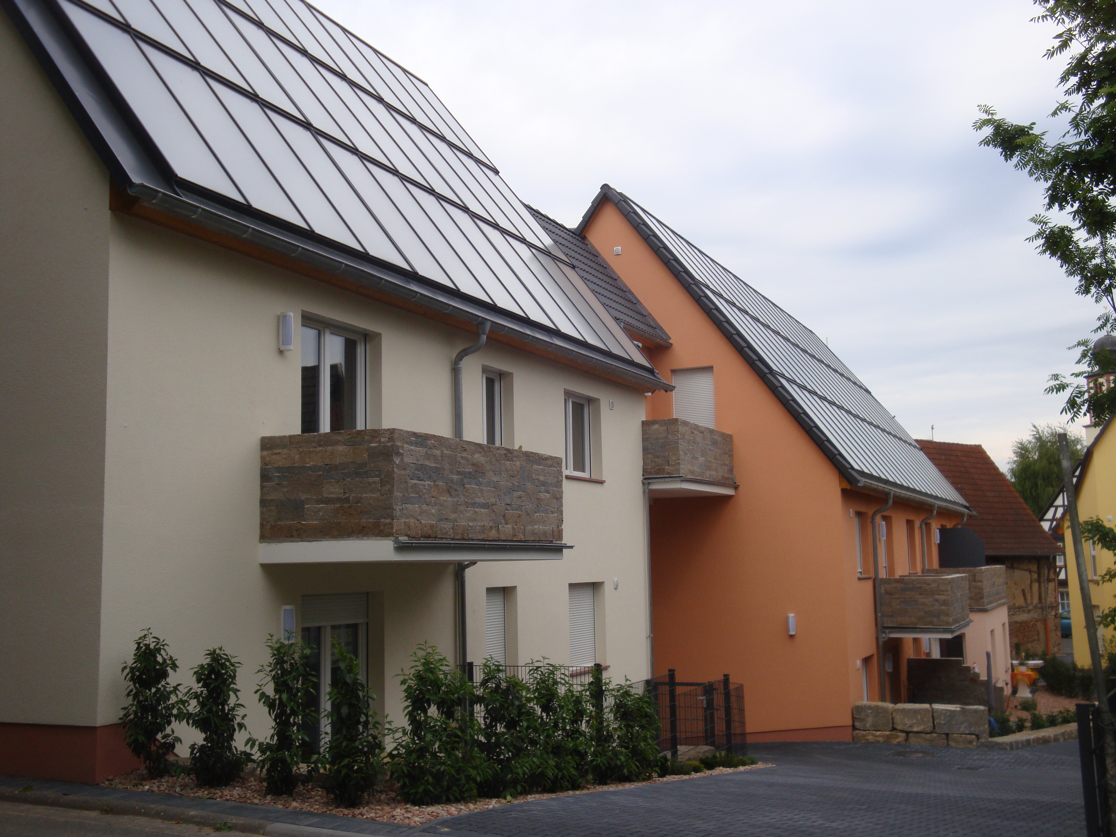 Solarhauskomplex bestehen aus 4 Neubauten und einem Altbau, 16 Wohneinheiten, Heizung mittels Solarthermie und Holz-Hackschnitzel, solarer Deckungsgrad von ca. 65 %, Speicherung mittels Solartank (66.900 Liter)